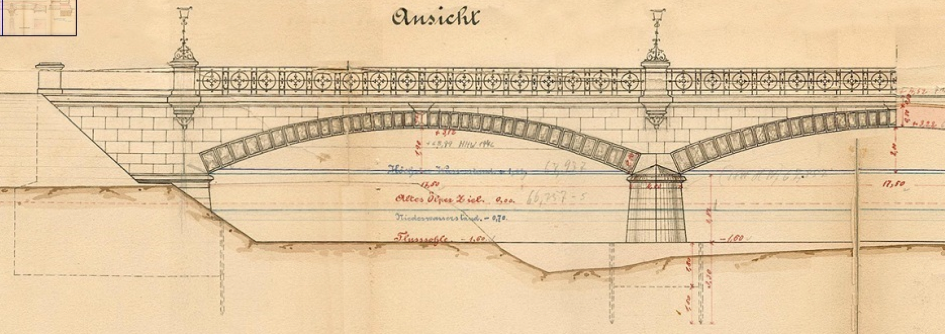 Querschnitt der Brücke